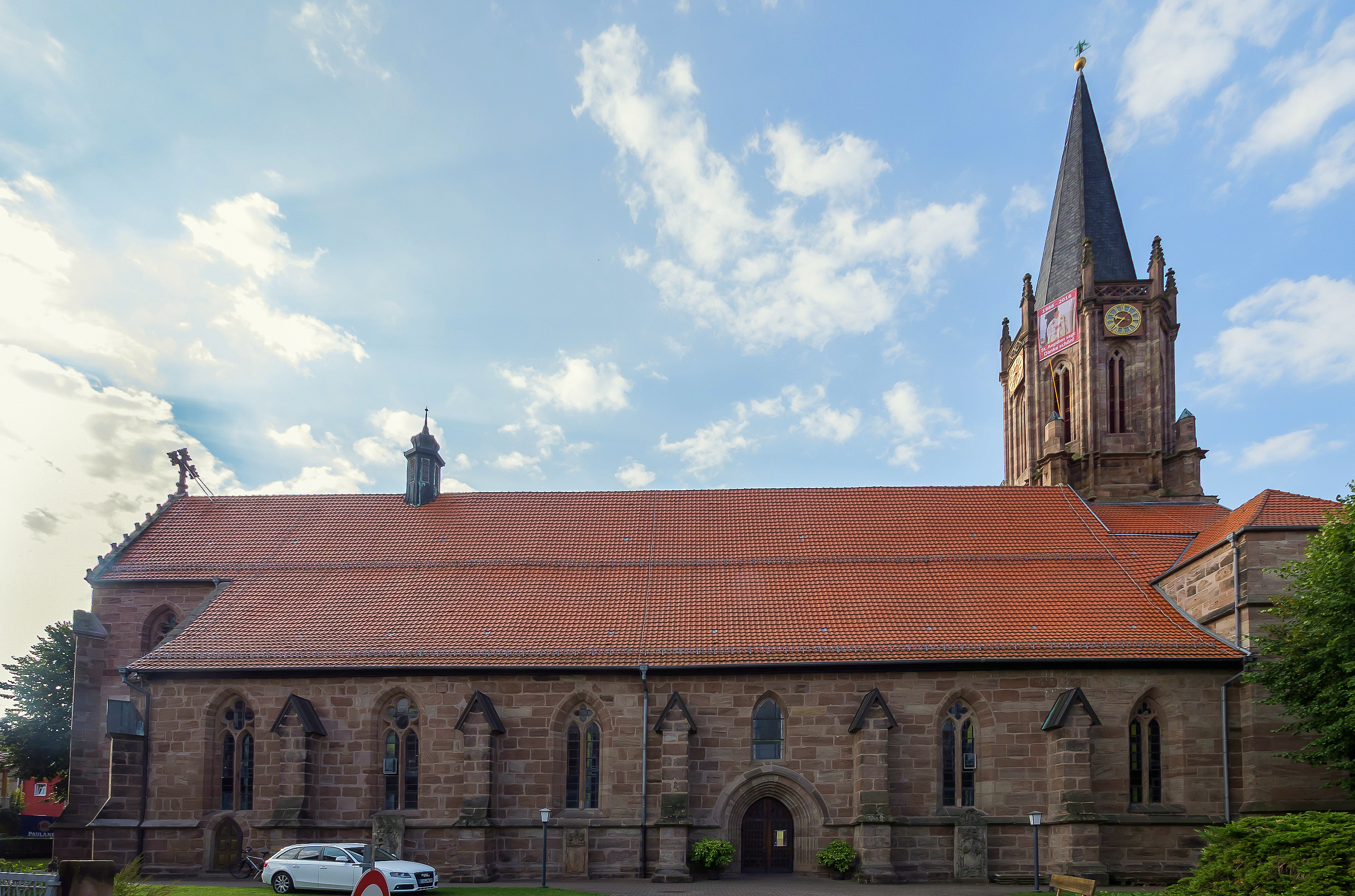 Heilbad Heiligenstadt Neustädter Kirchgasse 5 St. Ägidien Pfarrkirche (katholisch) Ausstattung Kirchhof 52